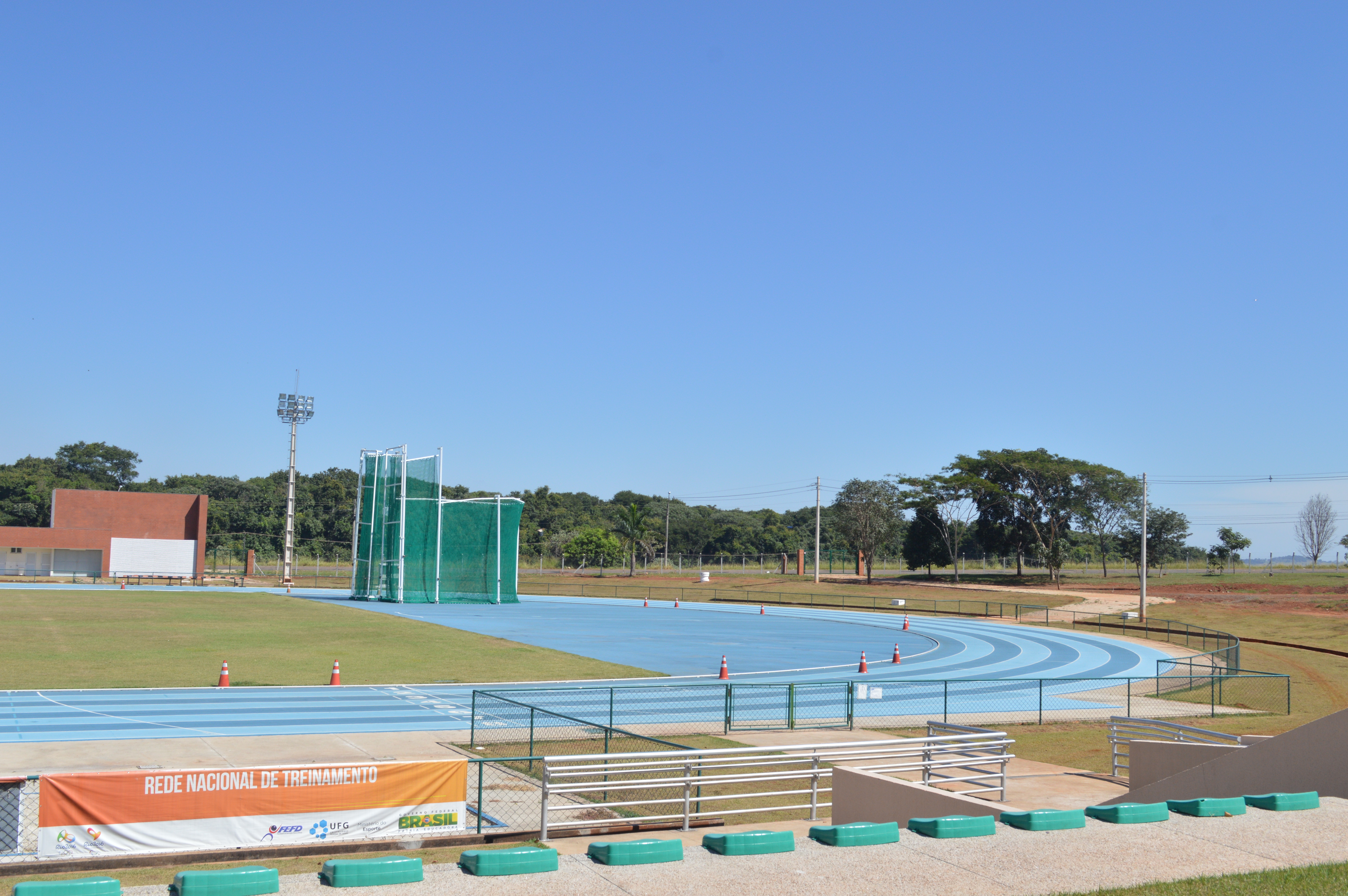 Faculdade de Educação Física, localizada no Campus Samambaia da Universidade Federal de Goiás. Foto de maio de 2016.